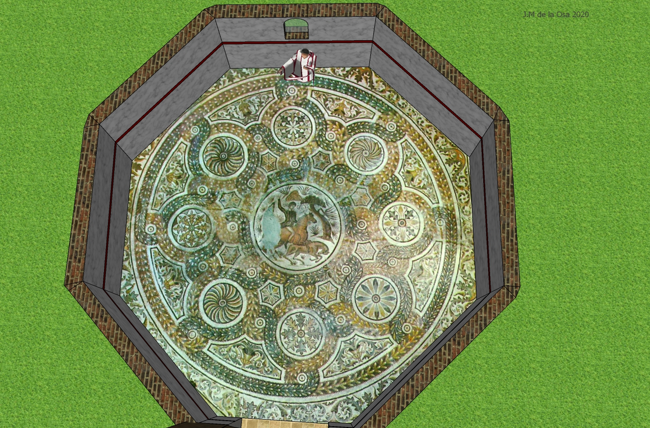 Una representacion grafica del mosaico de la habitacion 8 de la villa del Ramalete, Tudela Navarra. He añadido un personaje para que se vea el tamaño del mismo.